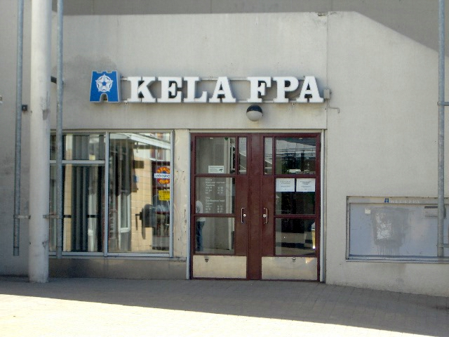 Kansaneläkelaitoksen toimipiste Helsingin Kontulassa. (Toimipiste on sittemmin suljettu.)